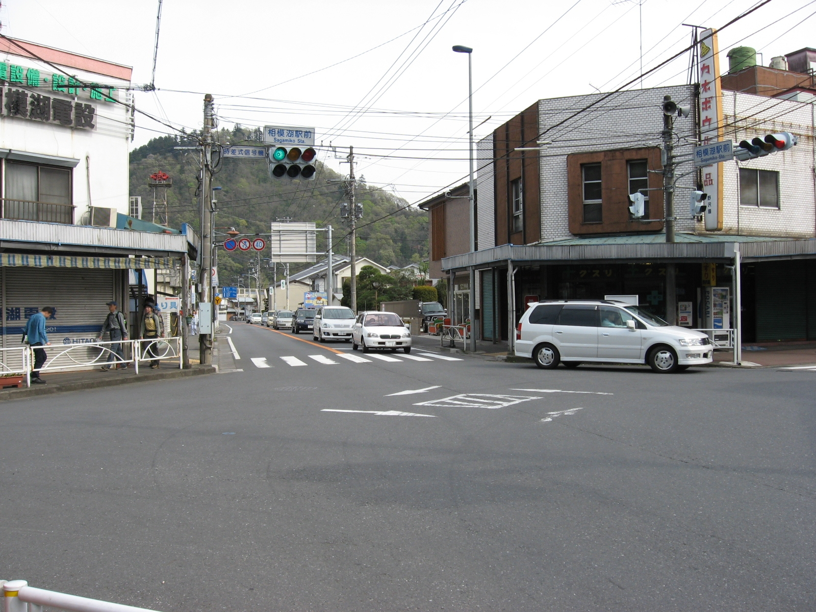 国道20号線、相模湖駅前交差点